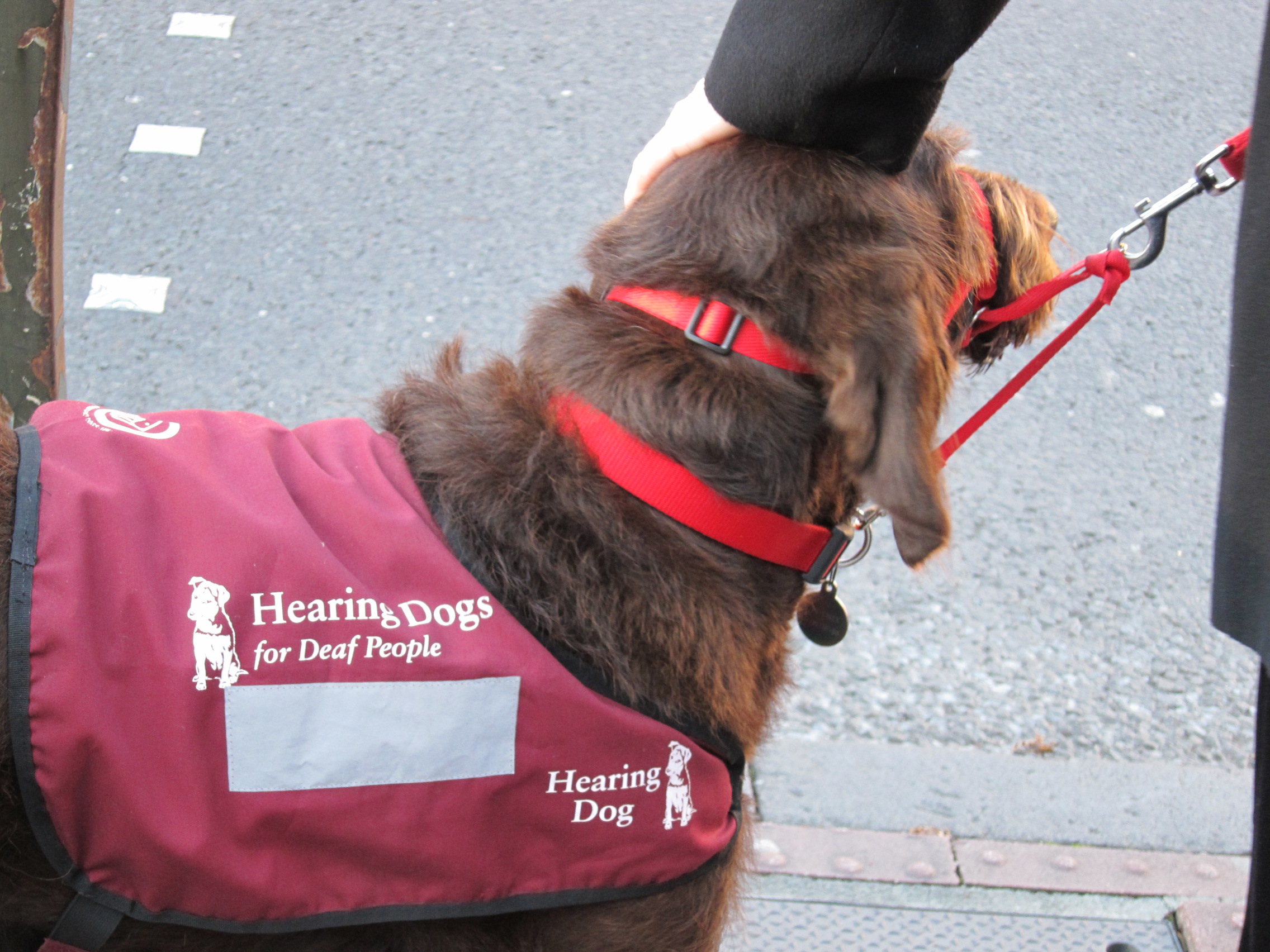 Ein Signalhund (englisch: Hearing dog) = Assistenzhund für Gehörlose oder Schwerhörige. Hier in Chester im Nordwesten Englands.